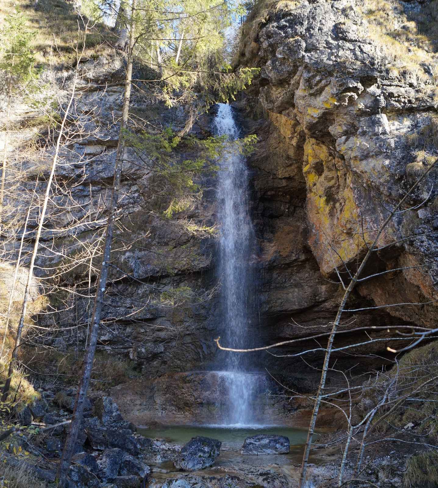 Almen im Hagertal am Brunnbach